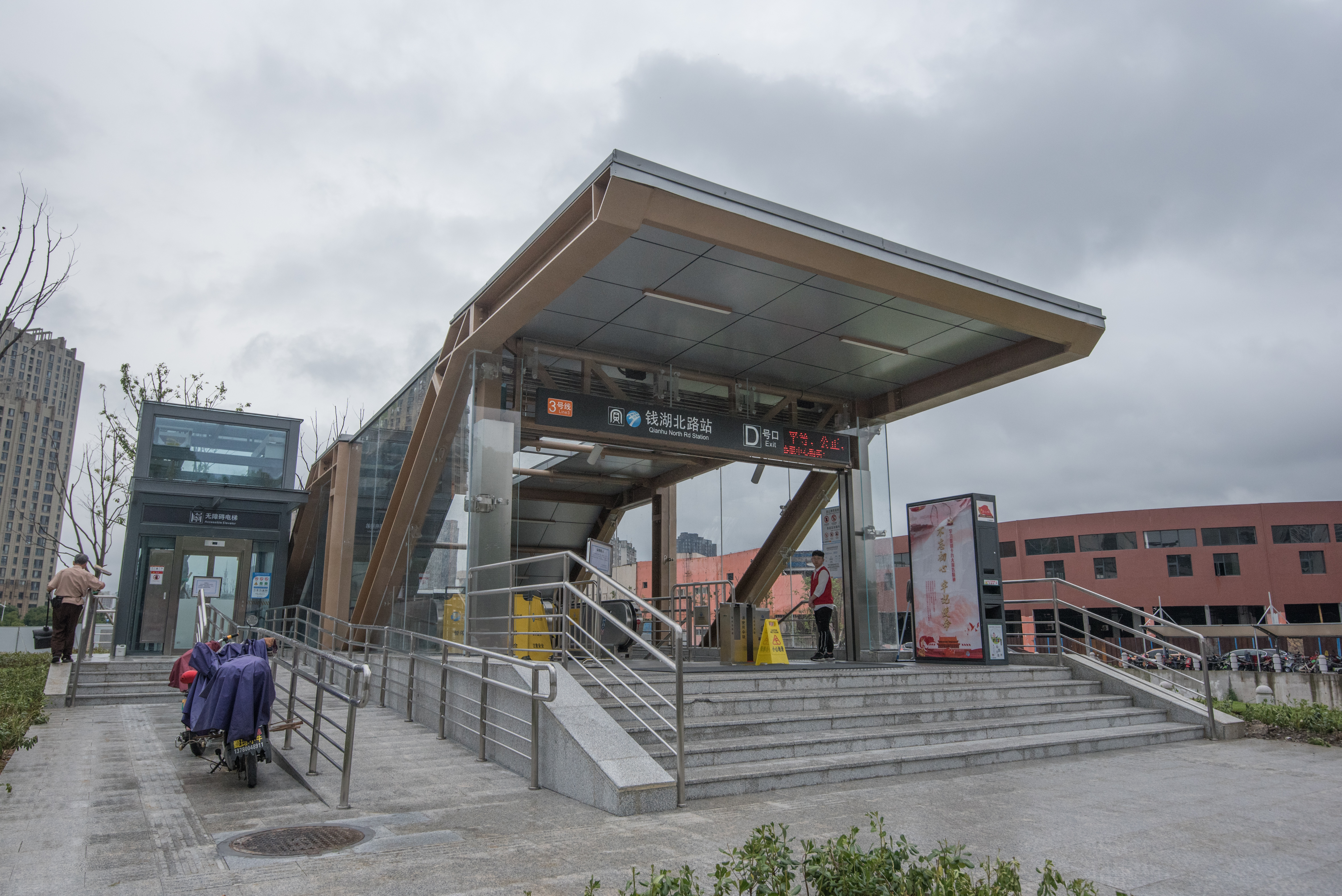 宁波地铁钱湖北路站